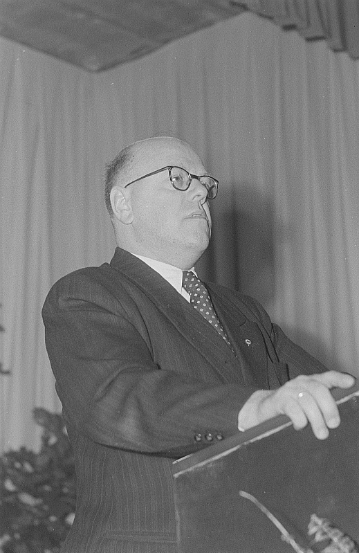 Original image description from the Deutsche Fotothek Karl Schirdewan